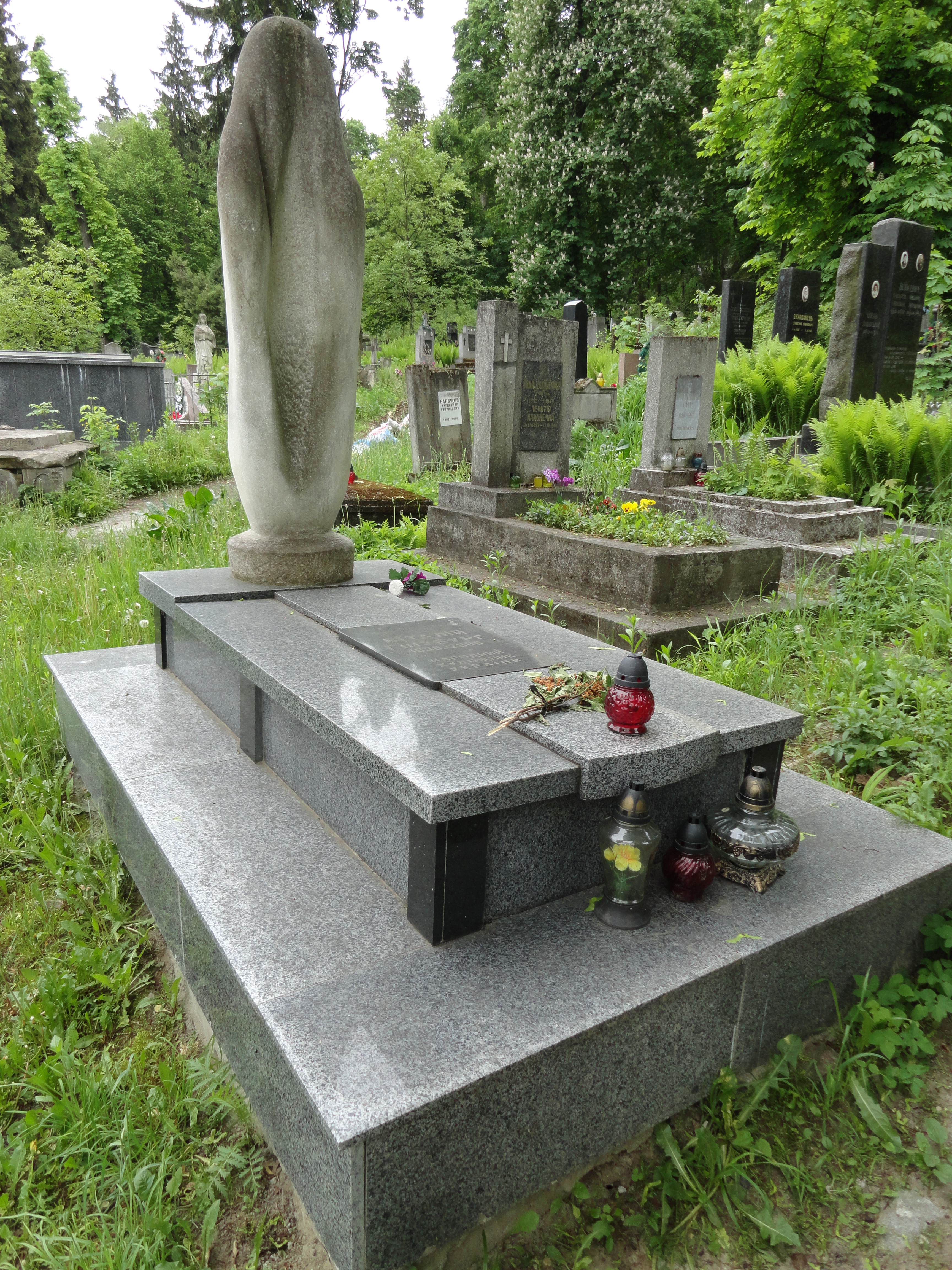 Памятник работы скульптора Татьяны Муединовой на могиле народного художника Украины Виталия Аркадьевича Гинзбурга (1938-2006) на Лычаковском кладбище (Львов).